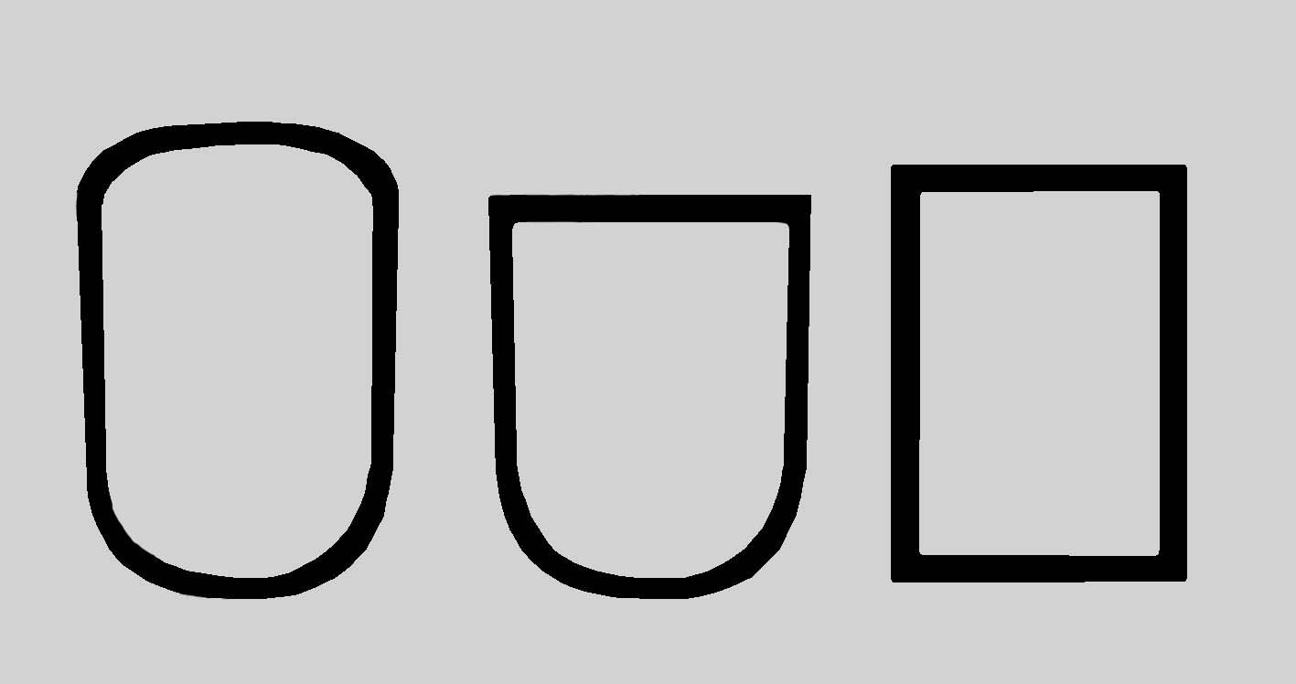 Typologie der podomorphen Petrosomatoglyphen auf Lanzarote nach Hans-Joachim Ulbrich